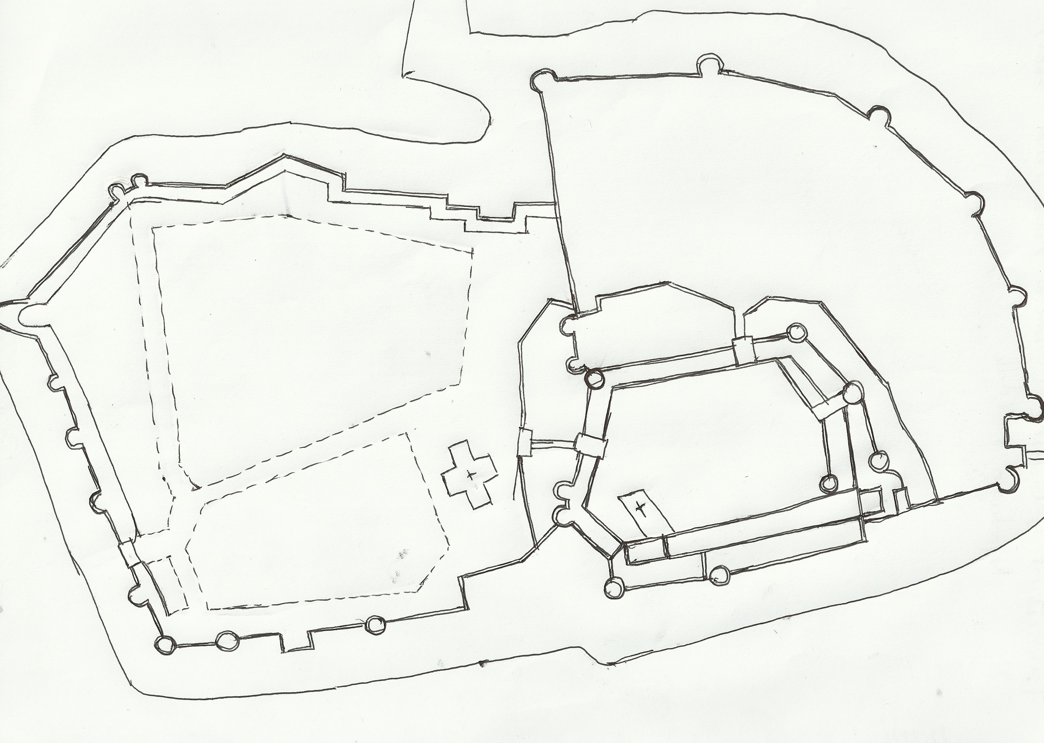 Plan des fortifications de la Garnache, à l'échelle, tiré de la gravure de 1660 de Mathieu Mérian.